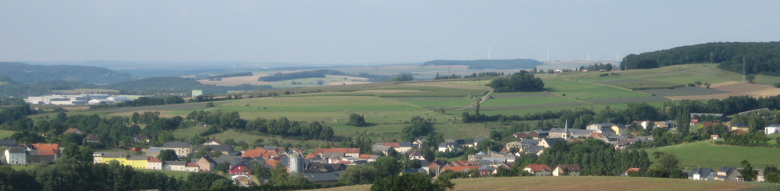 Uesweller, vu Süden aus gekuckt, am August 2008.